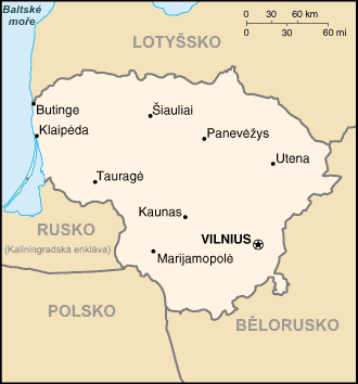 Mapa Litvy přeložená z CIA World Factbook